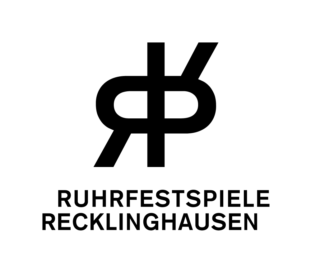 Für die Entwicklung des neuen Designs der Ruhrfestspiele hat Intendant Olaf Kröck die Düsseldorfer Agentur Scheer engagiert.